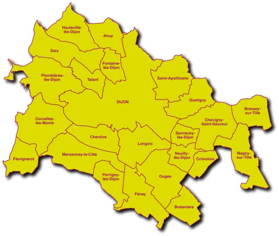 Carte des communes de Dijon métropole depuis le 1er janvier 2013.